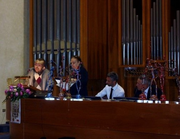 Alfredo Vernacotola primo classificato poesia edita 2014 a Firenze